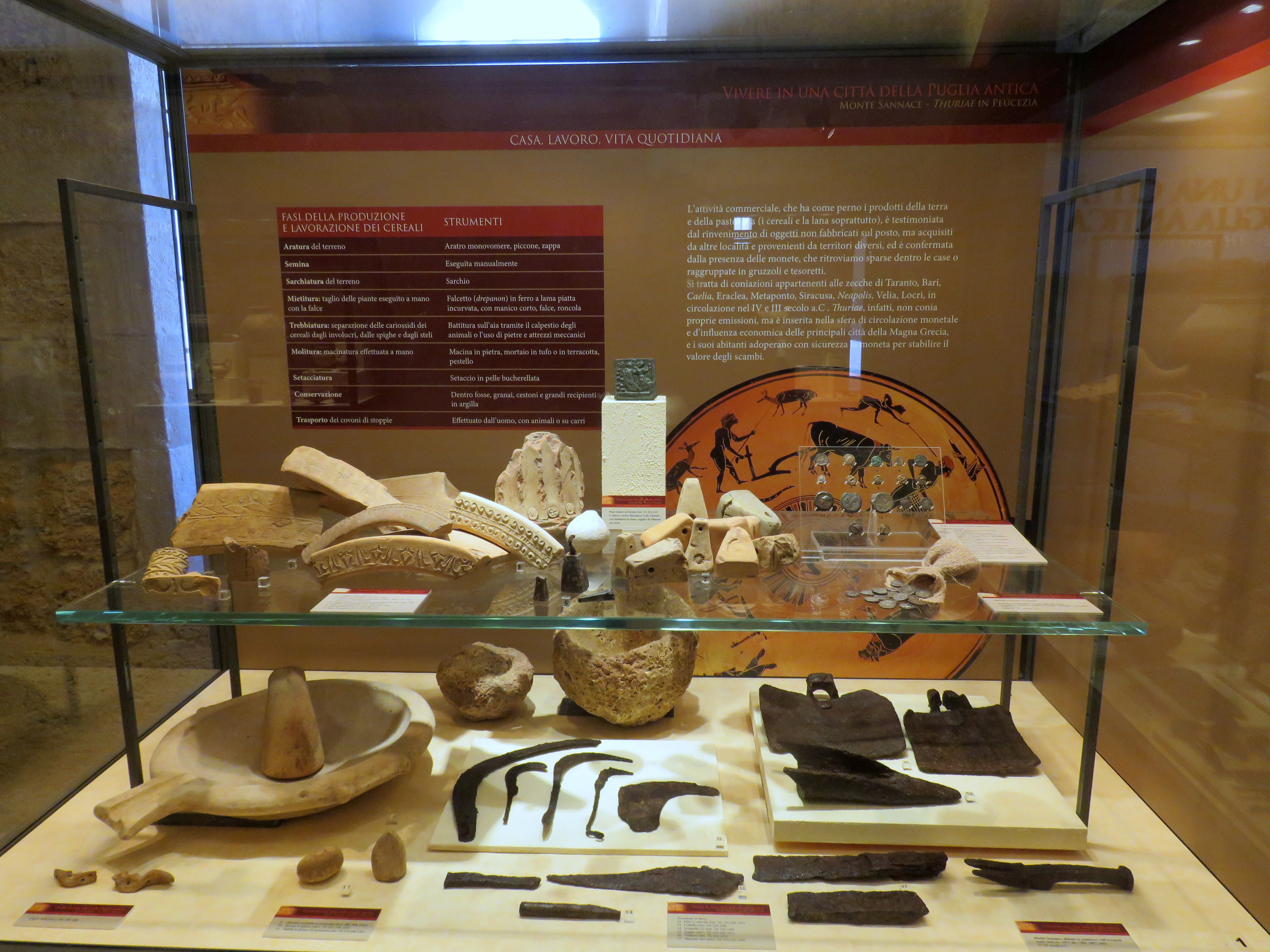 Vitrine dédiée aux activités productives